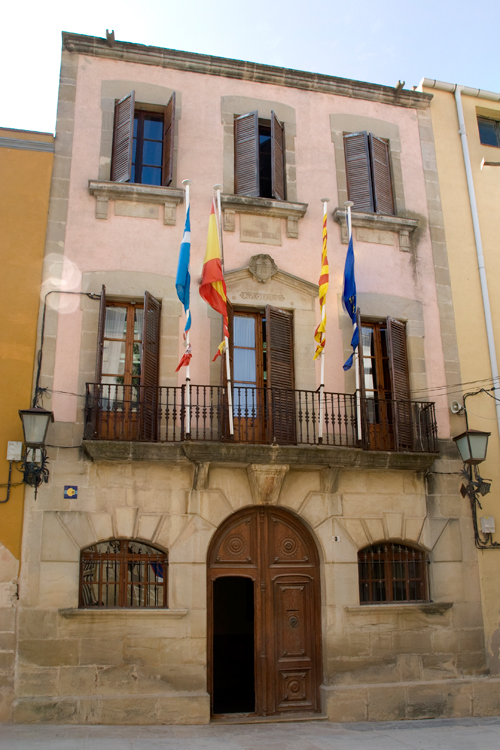 Ajuntament